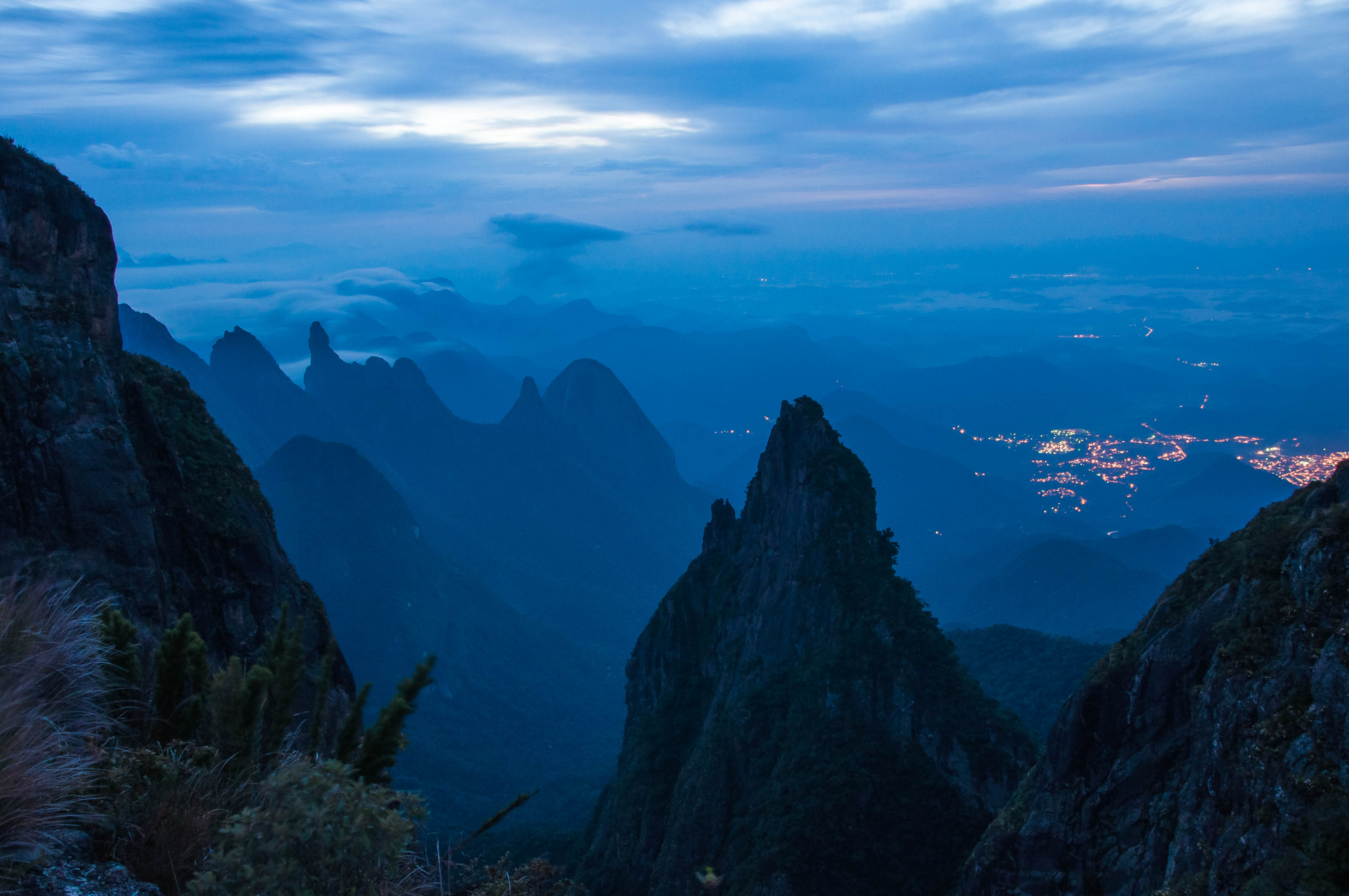 Serra dos Orgãos